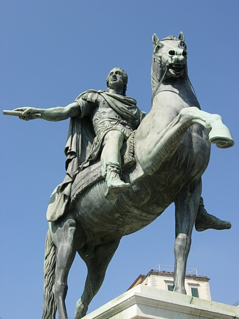 Naples,Campania (Italy). Ferdinando I di Borbone